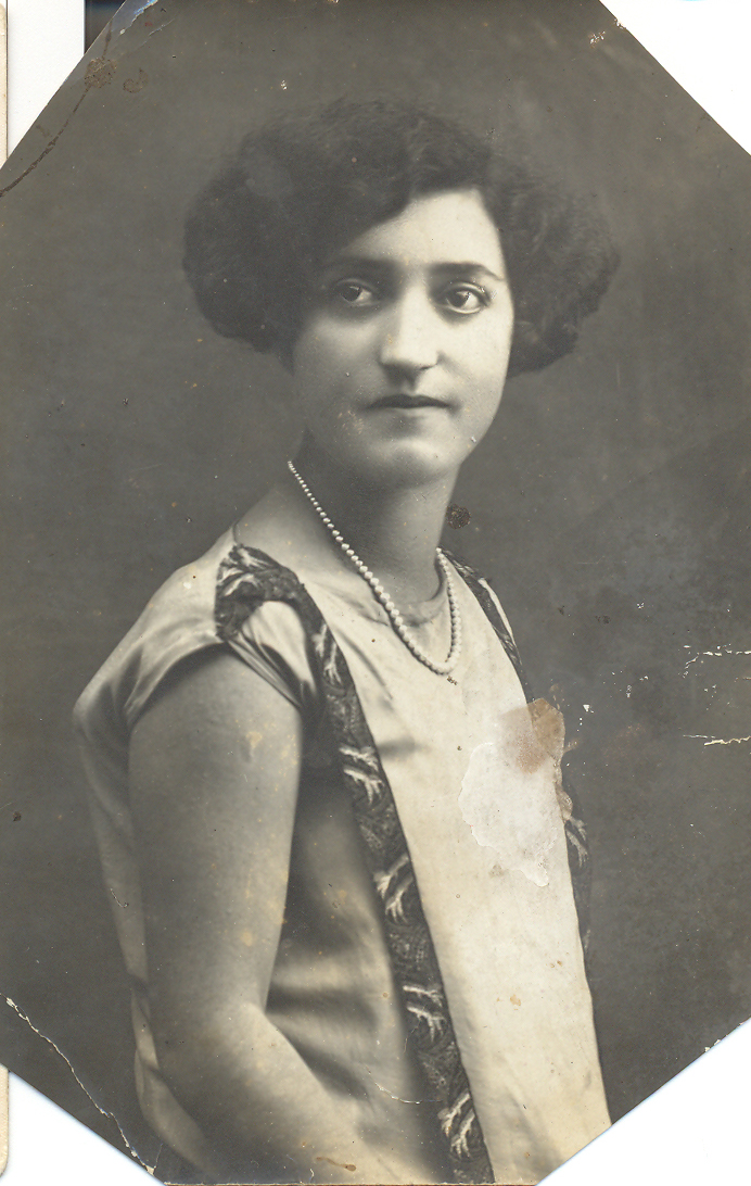 Olga Vukovic(majka Slobodanova) svrseni maturant beranske gimnazije